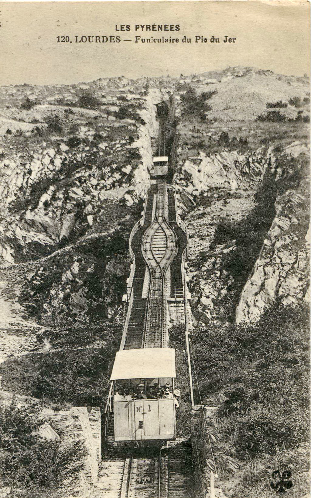 Carte postale ancienne éditée par MTIL, collection Les Pyrénées, n°120 :LOURDES - Funiculaire du Pic du Jer